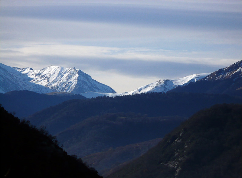 Пиренеи, Arbison